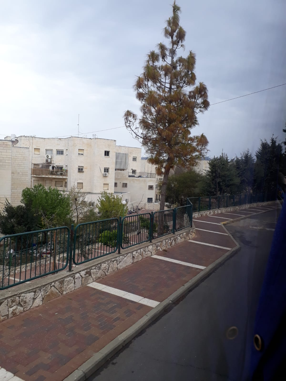 רחוב טיפוסי בקריית ארבע, מרץ 2019